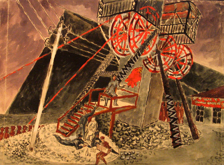 Игнатий Игнатьевич Нивинский. Эскиз декорации к спектаклю по пьесе И.К.Микитенко "Дело чести" в постановке МХТ-2-го. 1931. Бумага, акварель, тушь, перо